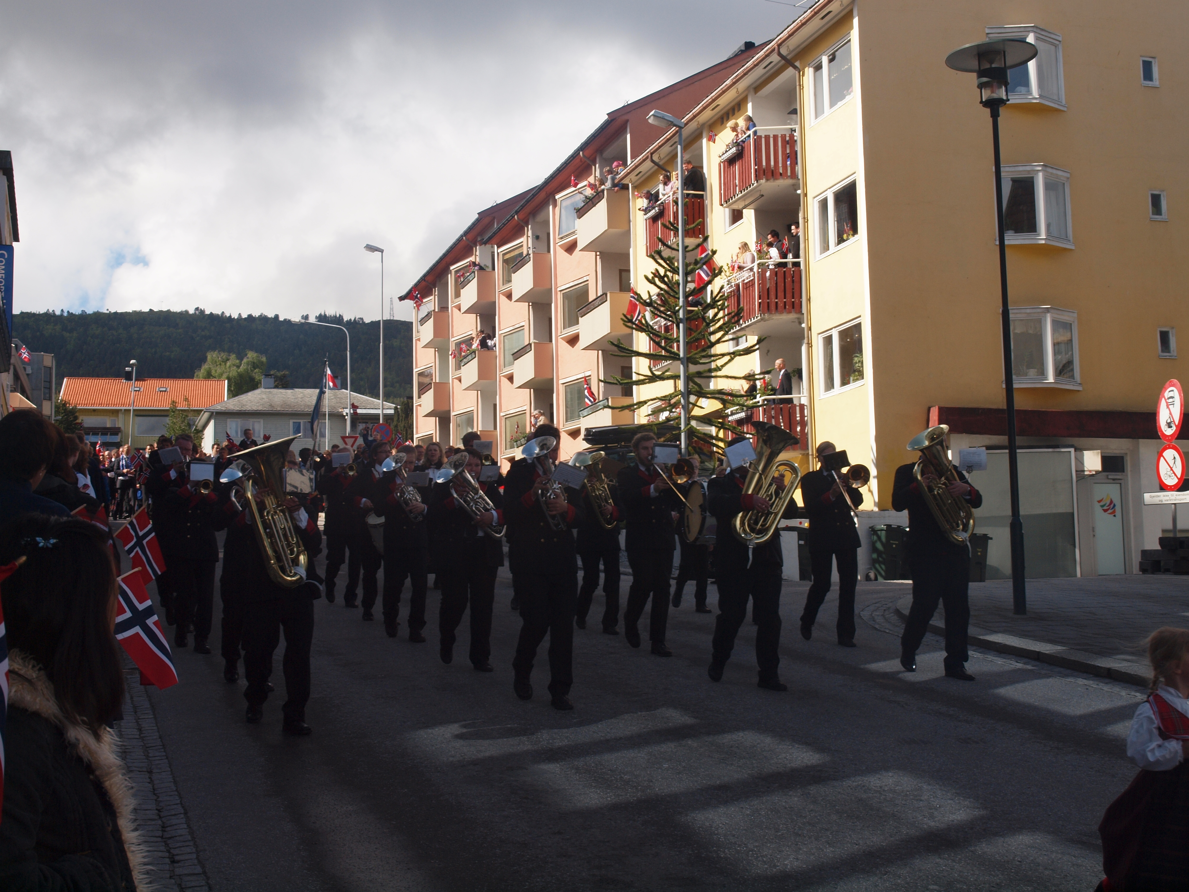 Molde Brass Band